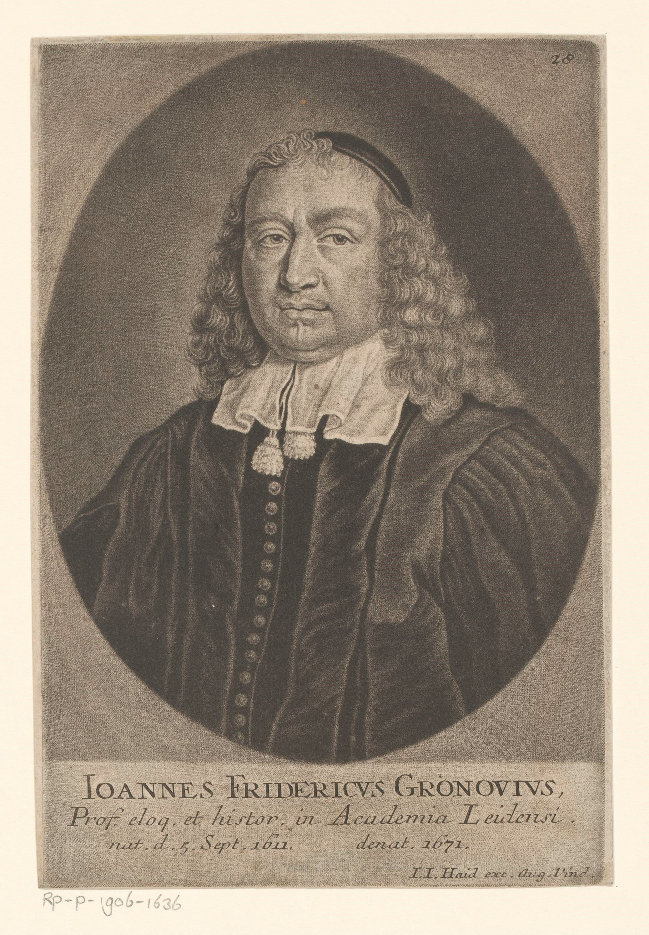 IdentificatieTitel(s): Portret van Johann Friedrich GronoviusObjecttype: prent Objectnummer: RP-P-1906-1636Catalogusreferentie: HAB A 8216Opschriften / Merken: verzamelaarsmerk, verso, gestempeld: Lugt 2228Omschrijving: Rechtsboven genummerd: 28.VervaardigingVervaardiger: prentmaker: Johann Jacob Haid (mogelijk)uitgever: Johann Jacob Haid (vermeld op object)Plaats vervaardiging: AugsburgDatering: 1747Materiaal: papier Techniek: mezzotintAfmetingen: plaatrand: h 215 mm × b 143 mmToelichtingPrent gebruikt voor: Brucker, Jacob. Ehrentempel der Deutschen Gelehrsamkeit. Augsburg: Johann Jacob Haid, 1747.OnderwerpWat: historical personsWie: Johann Friedrich GronoviusVerwerving en rechtenVerwerving: aankoop 1906Copyright: Publiek domein